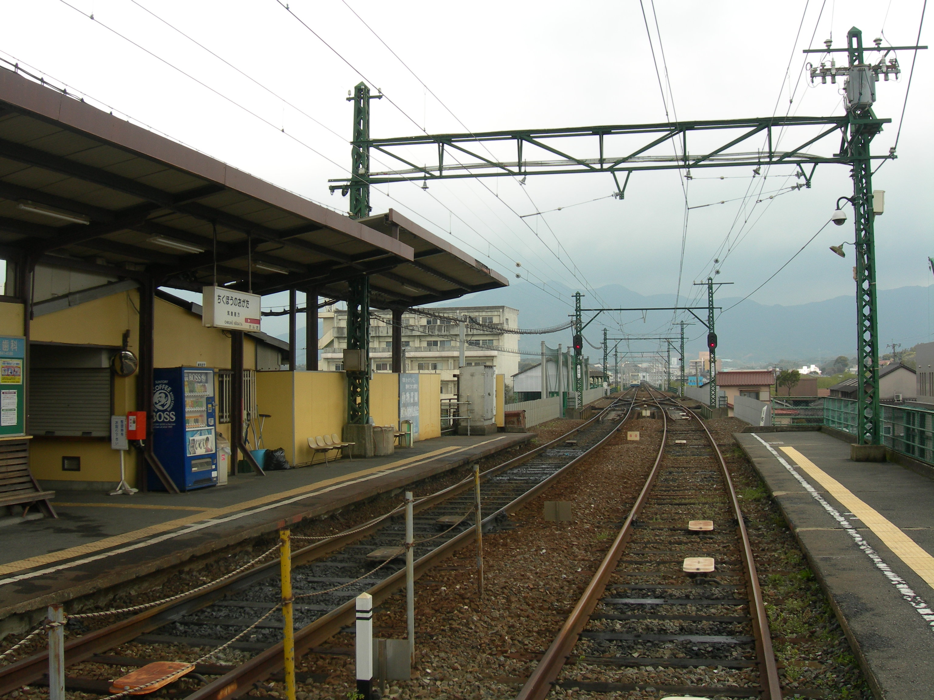 筑豊直方駅プラットホーム